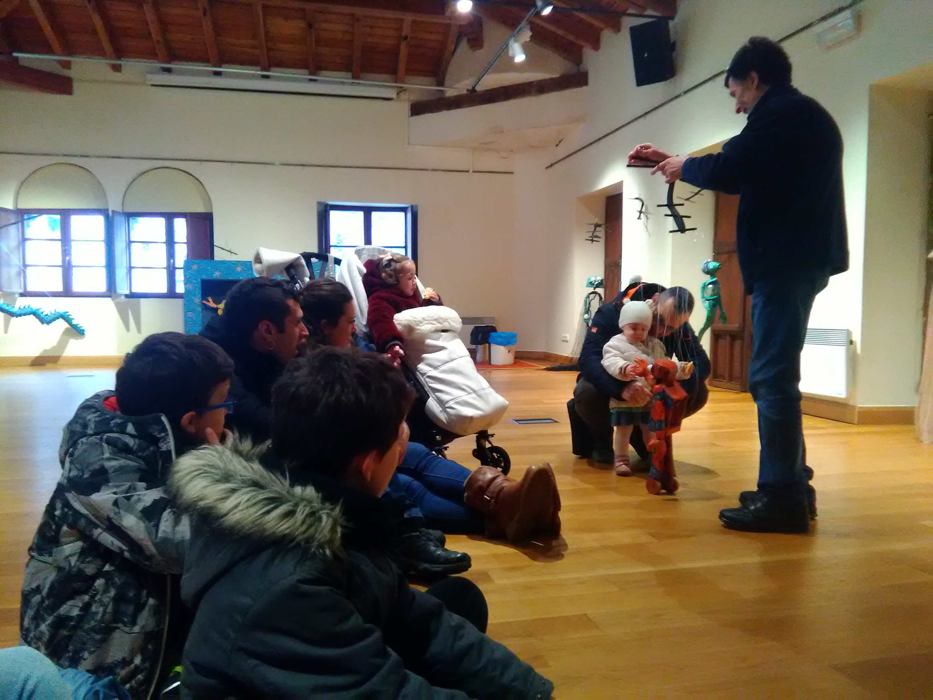 Corrado Masacci marioneta bat (haridun txotxongiloa) manipulatzen, Ondarroako Kofradi Zaharrean.